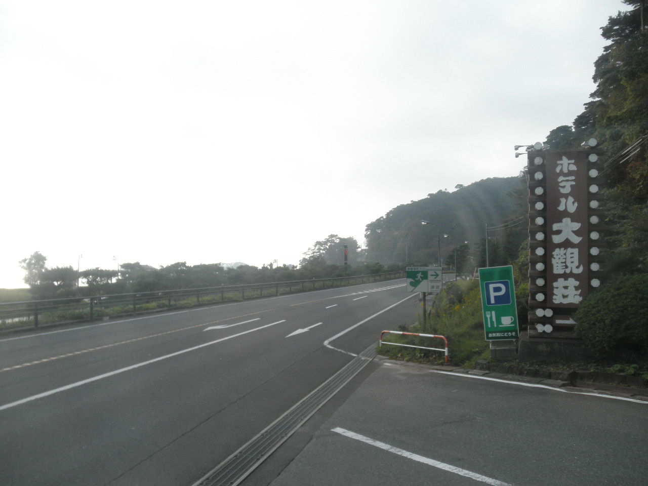 宮城県宮城郡松島町 国道45号